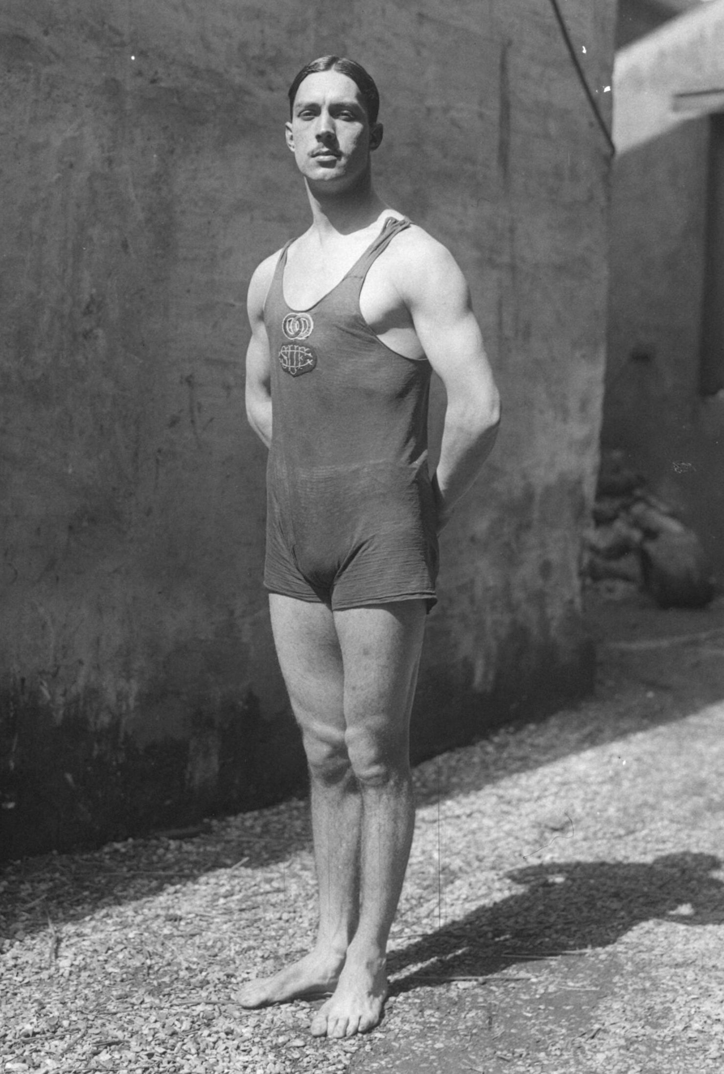 Decoin [portrait du nageur] : [photographie de presse] / [Agence Rol]